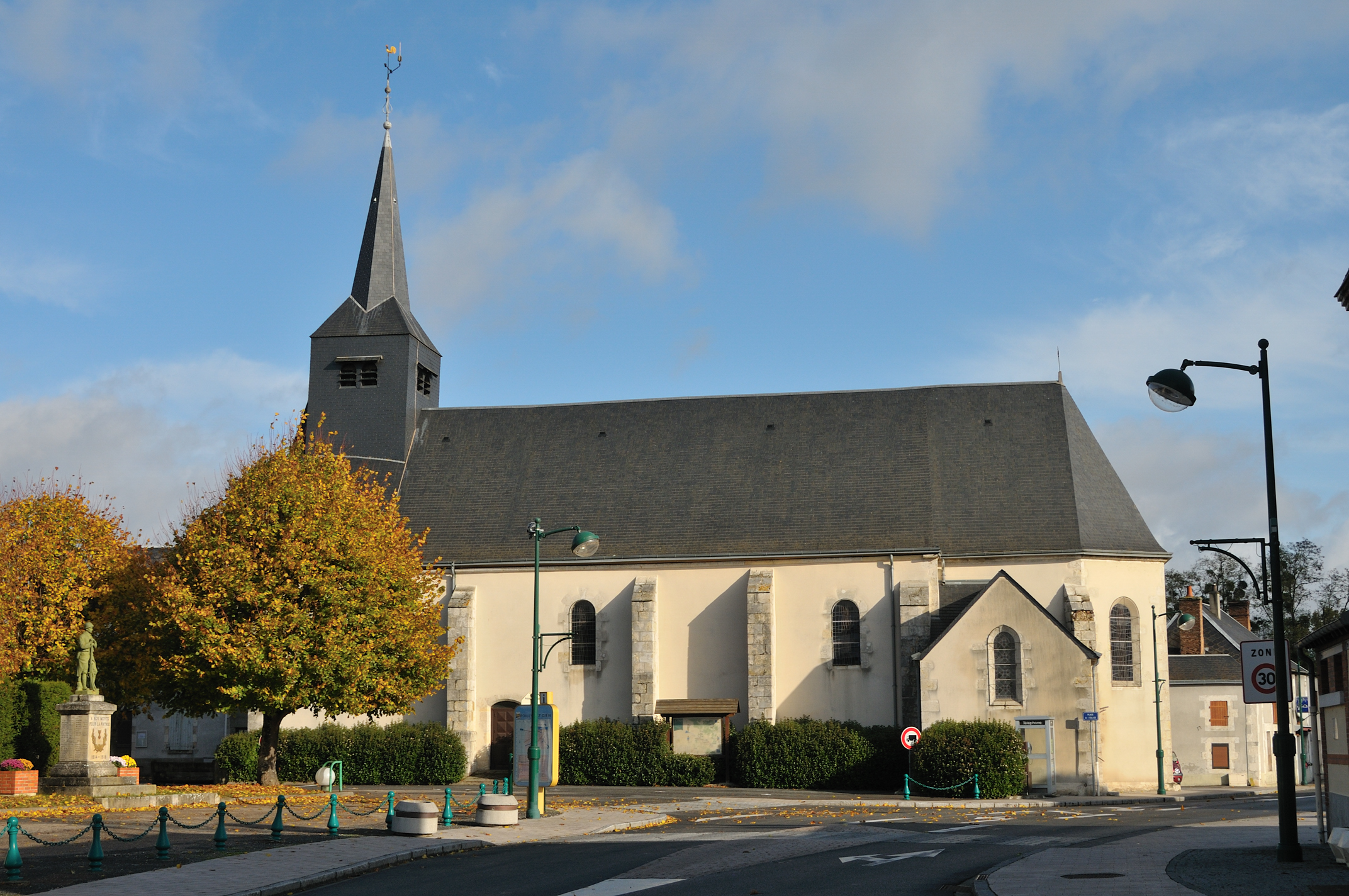 Église Saint-Pierre, Poilly-lez-Gien, Loiret, France